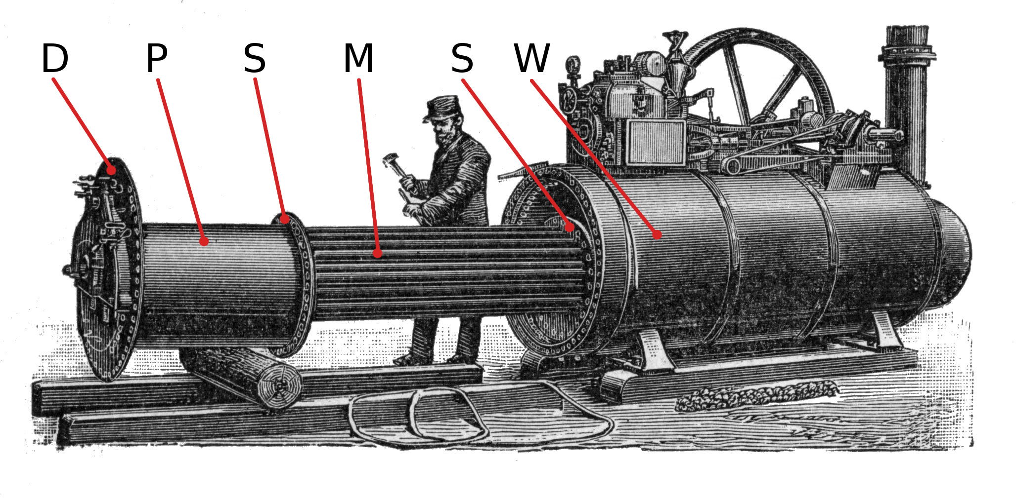 Grafika z Encyklopedii Orgelbranda z 1900r. D - dennica S - ściany sitowe W - walczak rury ogniowe: P - płomienica z paleniskiem M - płomieniówki Oznaczenia części dodał Topory (dyskusja).